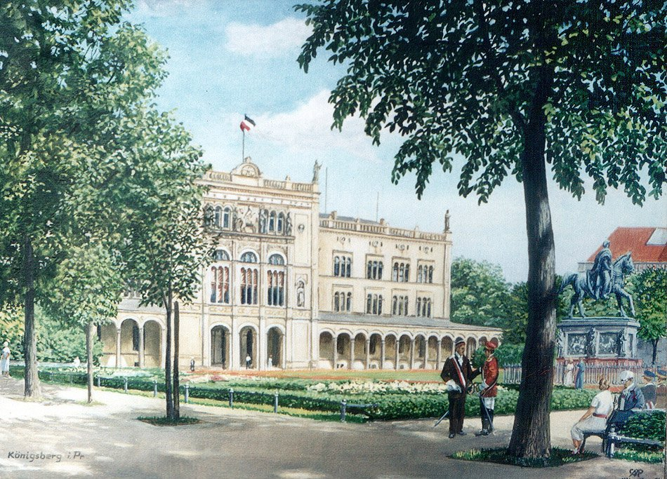 Kolorierte Postkarte mit der Albertus-Universität und dem Reiterdenkmal von König Friedrich Wilhelm III. (Kiß, 1851)